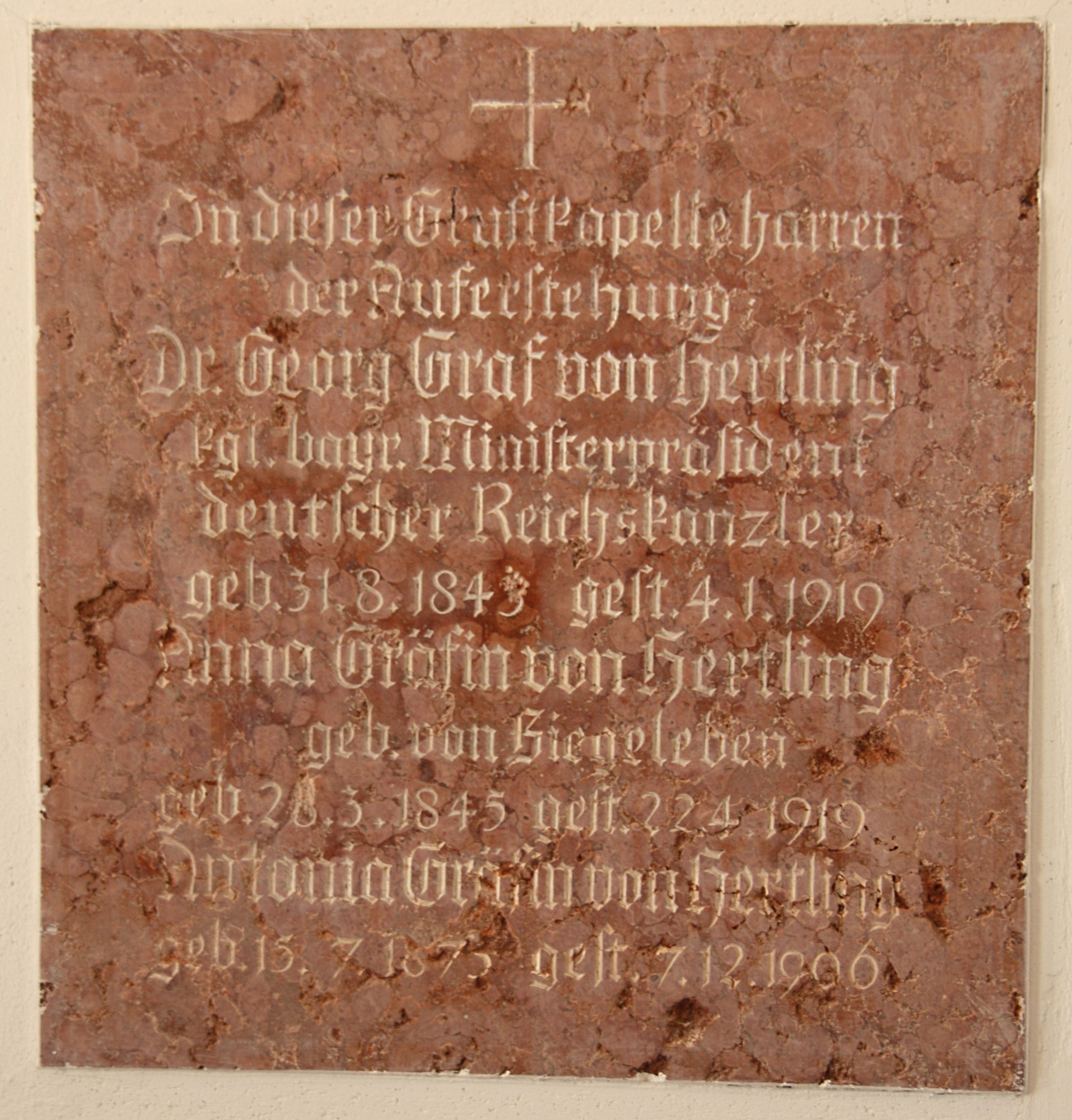 Grabtafel des Reichskanzlers Georg Graf von Hertling in der Grabkapelle des Bergfriedhofs Ruhpolding an der Pfarrkirche St. Georg. Die Kapelle steht am Standort der Vorgängerbauten der Georgskirche.